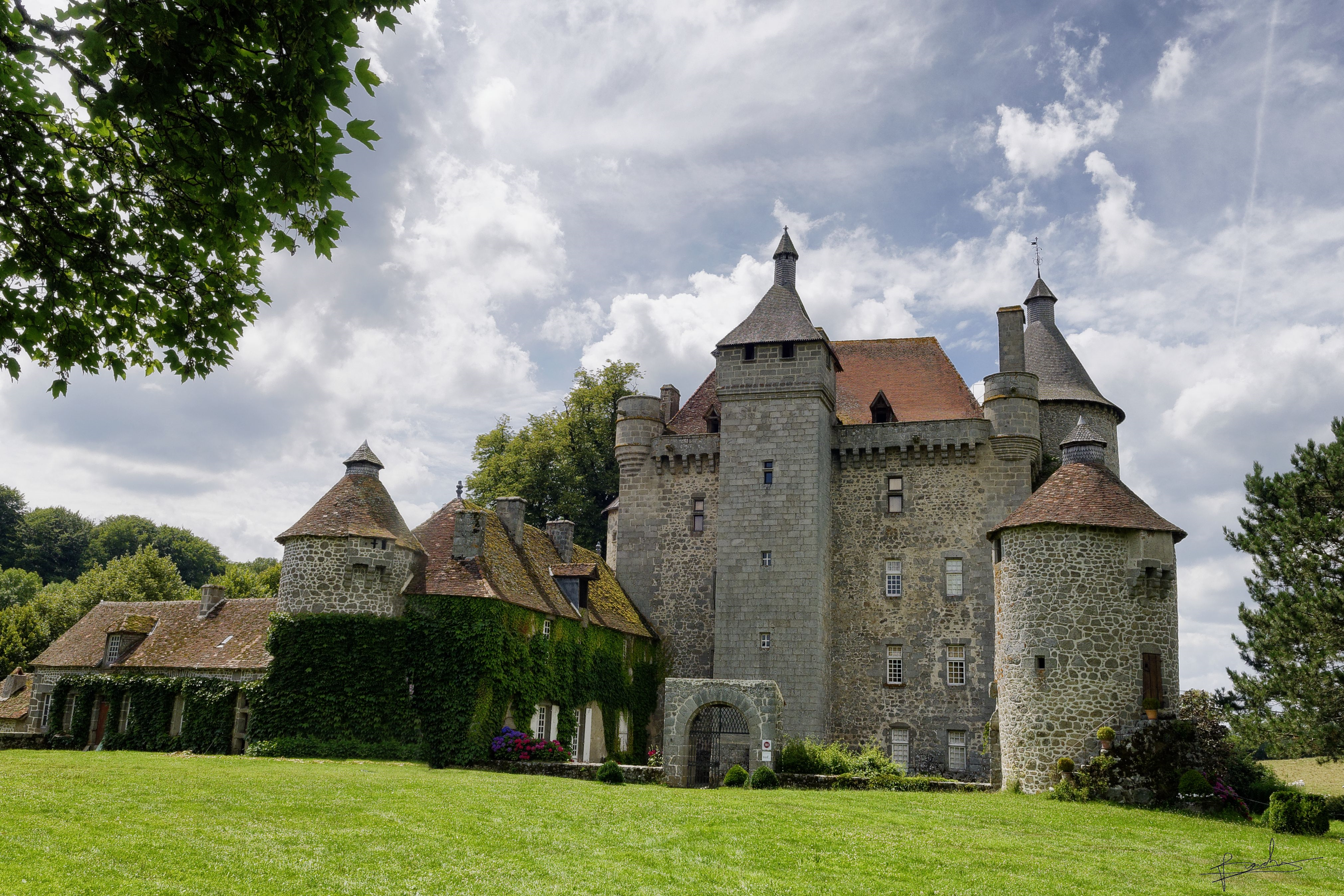 Château de Villemonteix, vue d'ensemble .